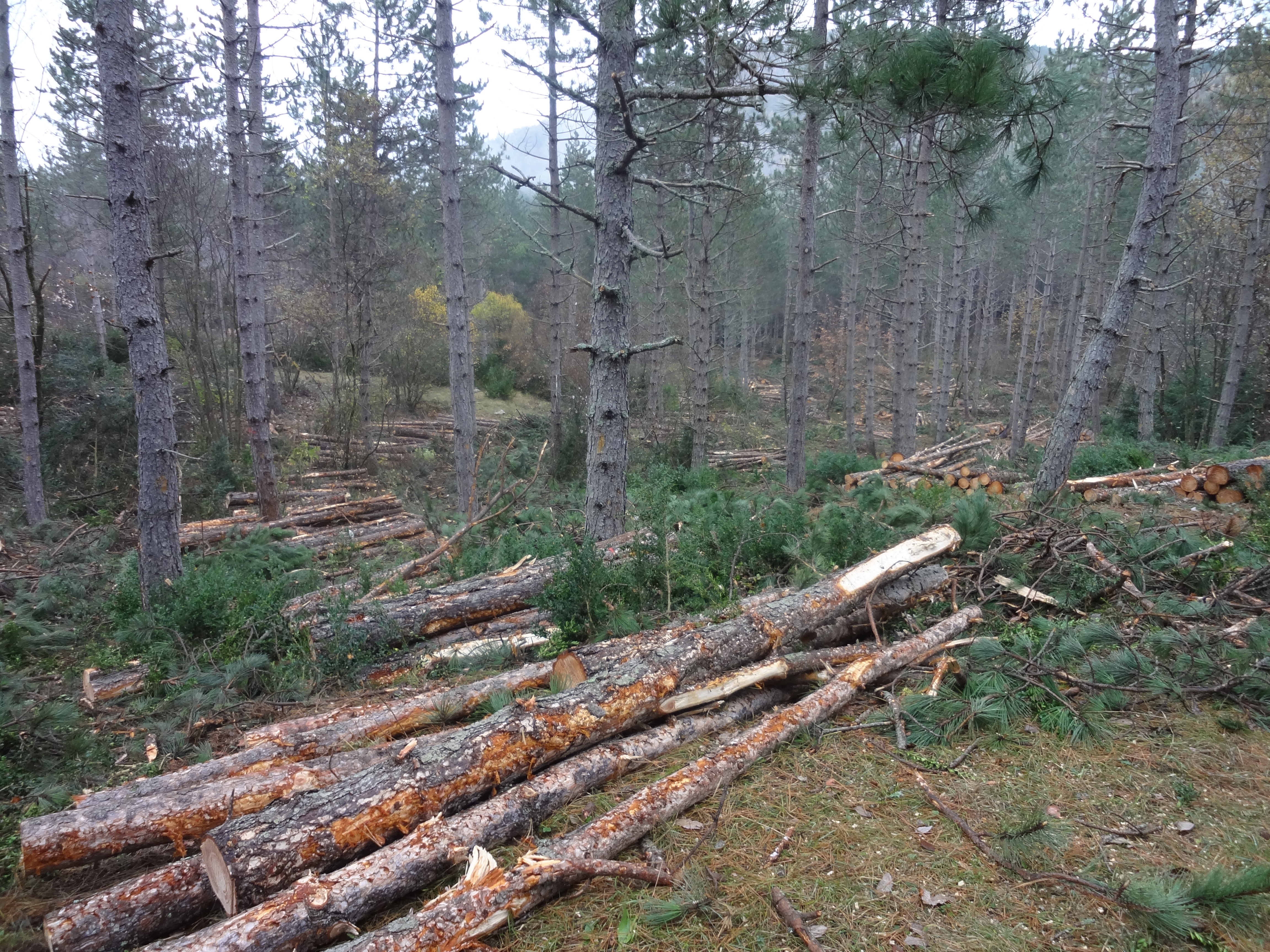 Coupes dans le Grand Vallon